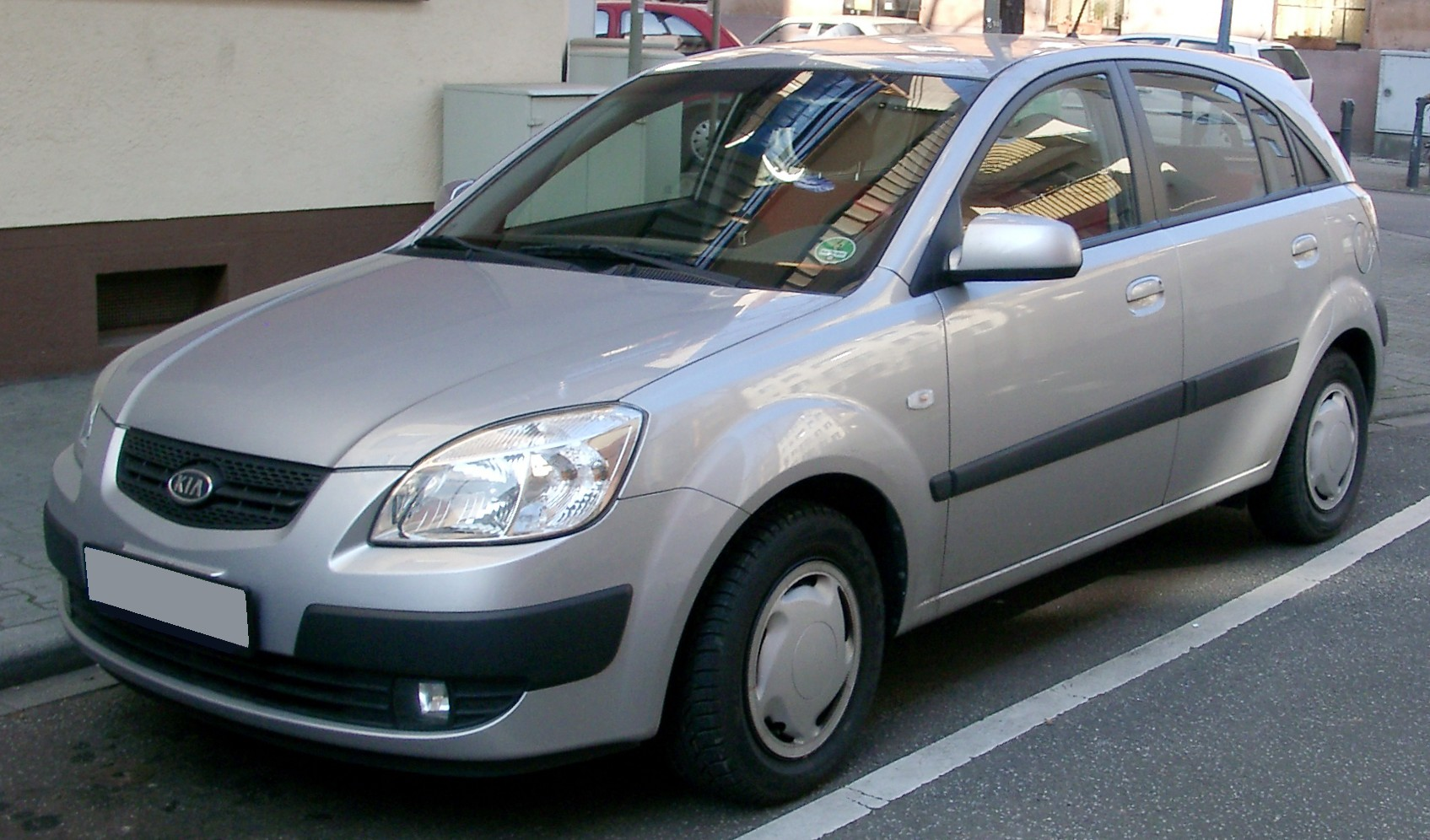 Kia Rio, 2. Generation